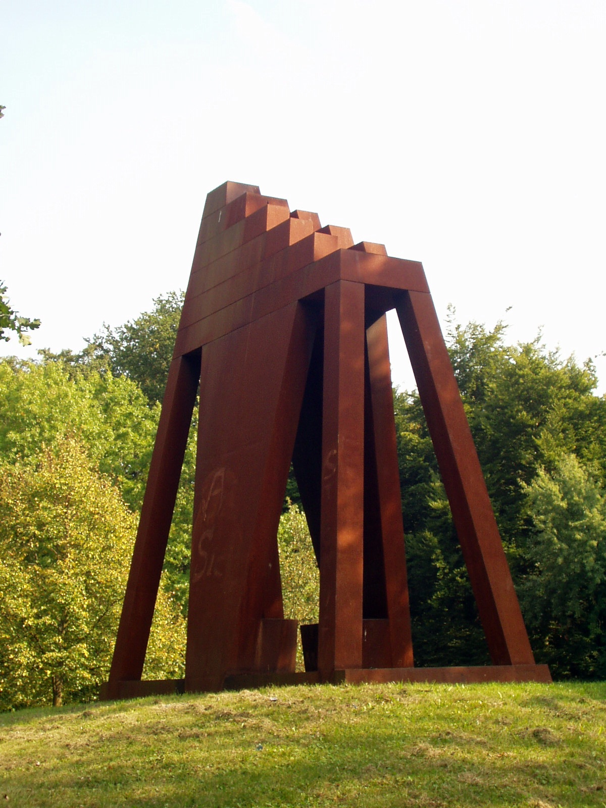 sculpture Erhöhte Abstufung by Claus Bury in Giessen/Germany